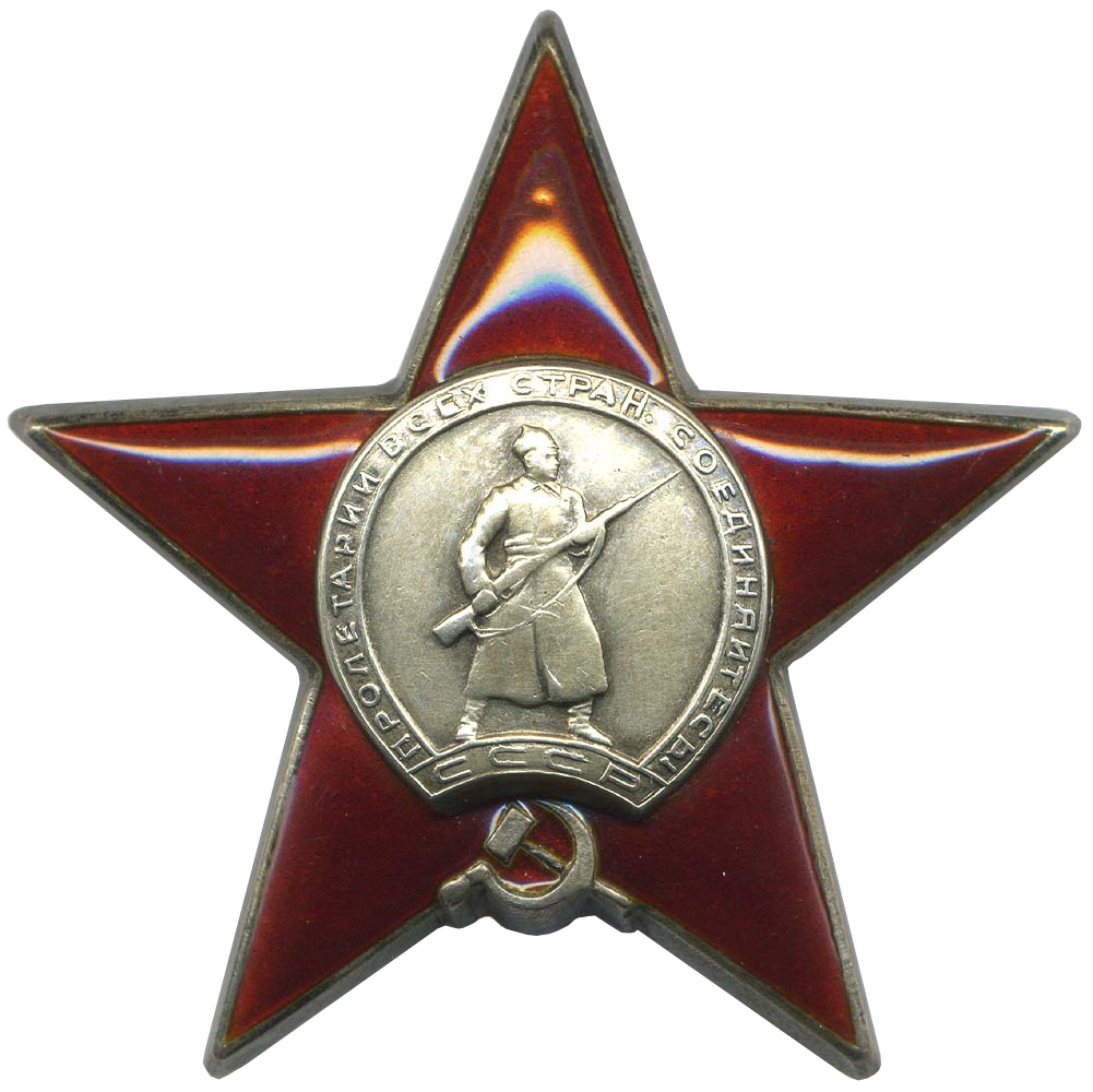 источник изображения File:Order of the Red Star.jpg